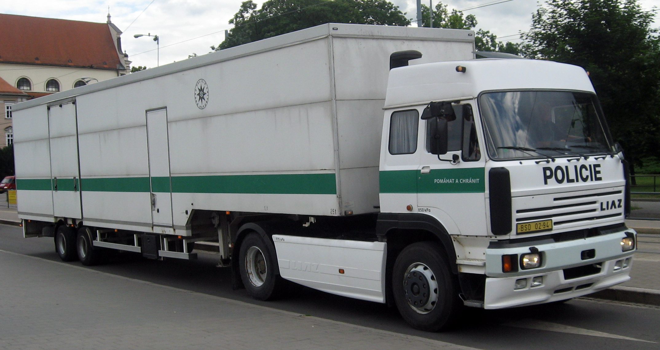 Policejní Liaz na přepravu koní